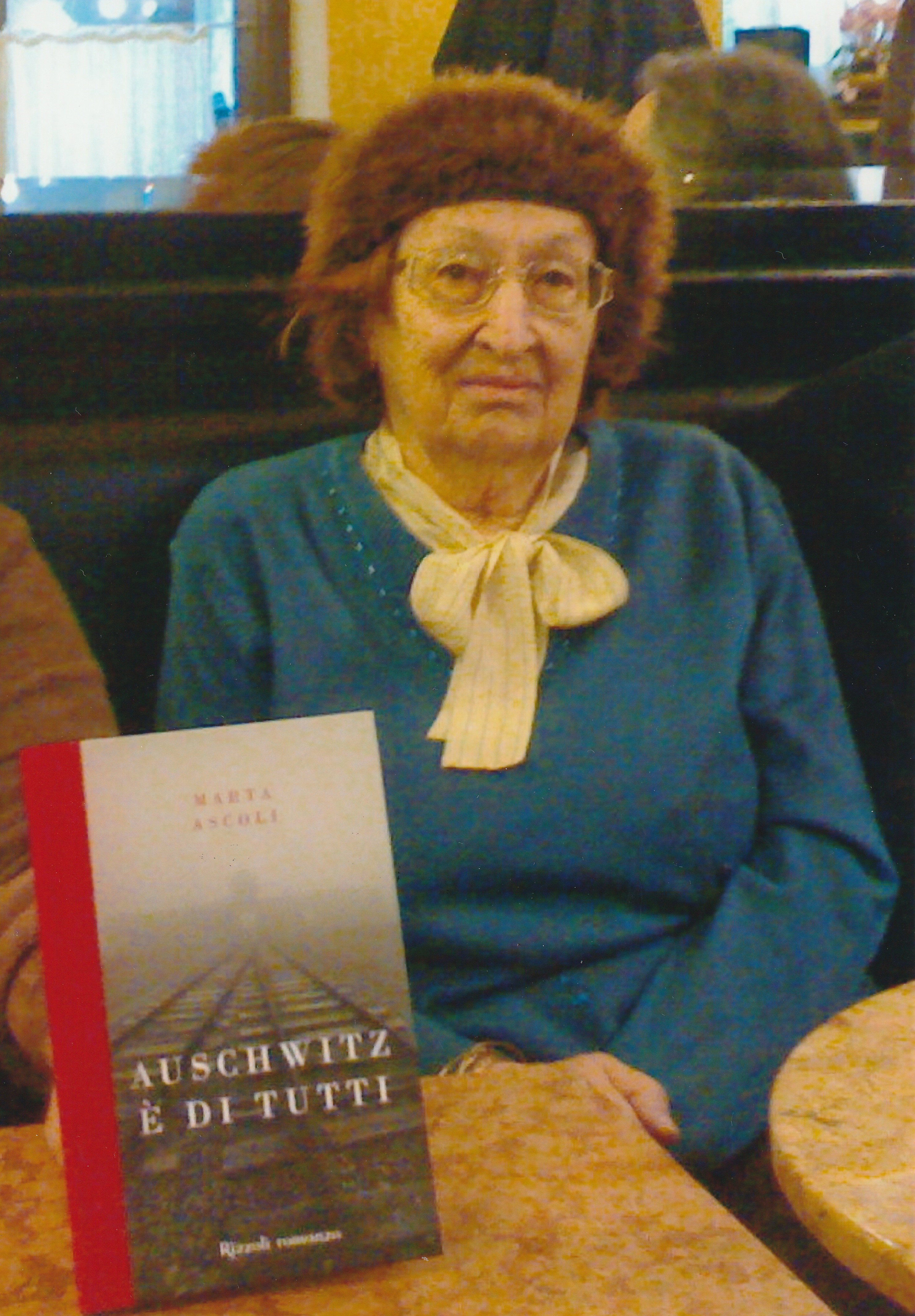 Marta Ascoli